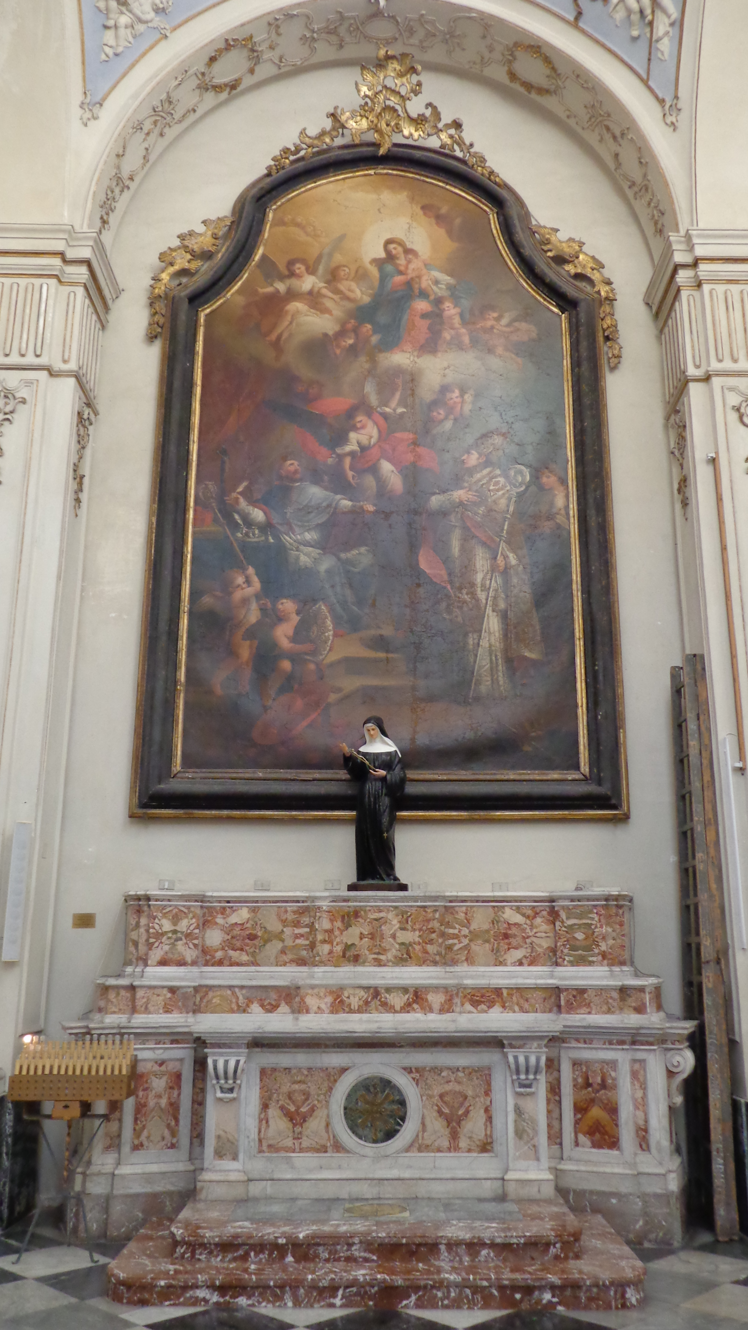 Altare